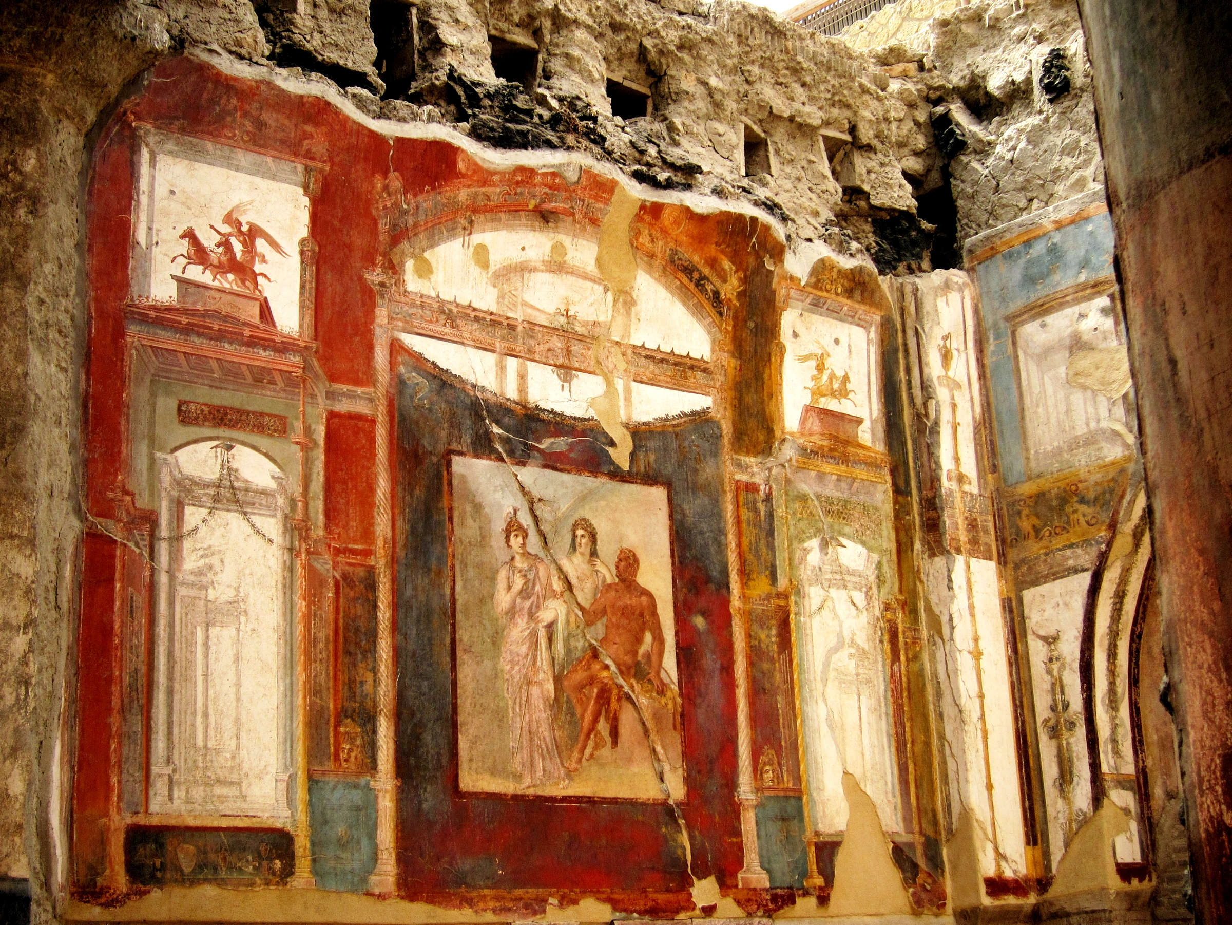 Fresque du Collegio degli Augustali à Herculanum représentant Hercule dans l'Olympe avec Junon et Minerve.